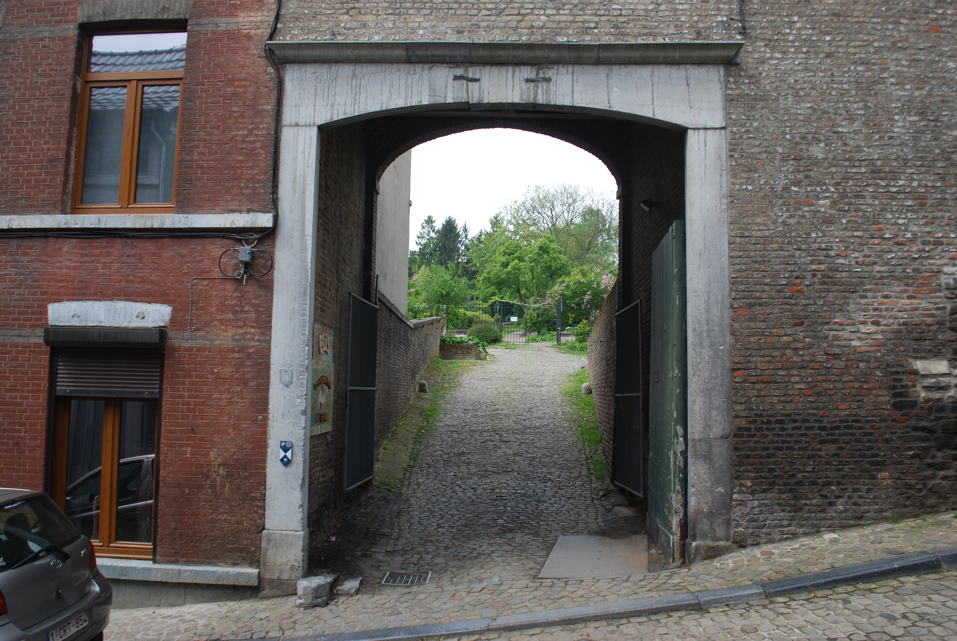 Vue des côteaux de la Citadelle, à Liège.